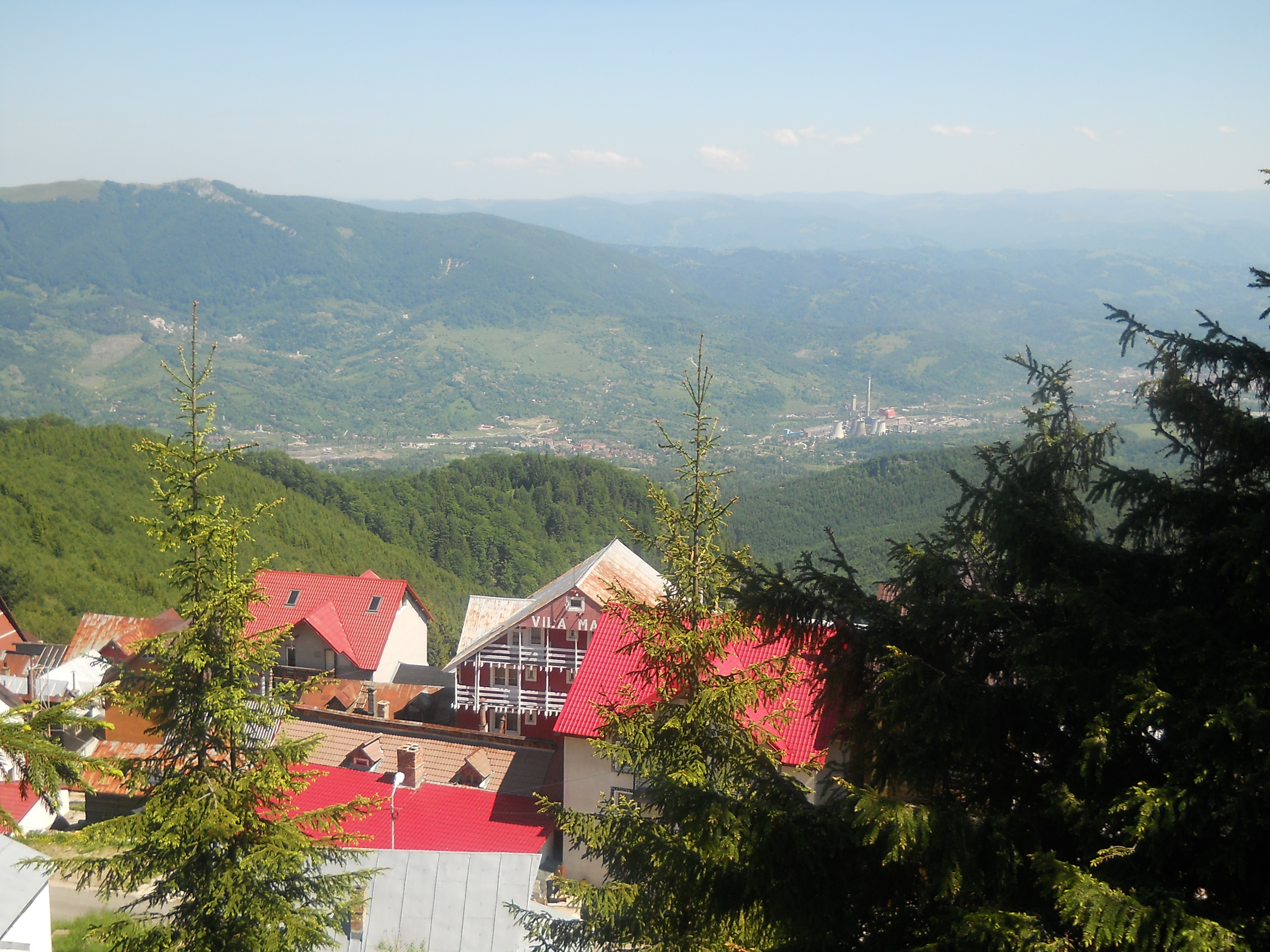 imagine din Straja, HD